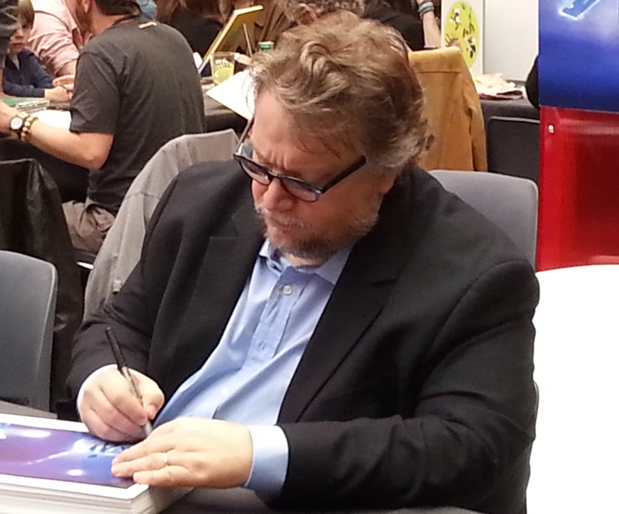 Guillermo del Toro au festival international du film d'animation d'Annecy 2016